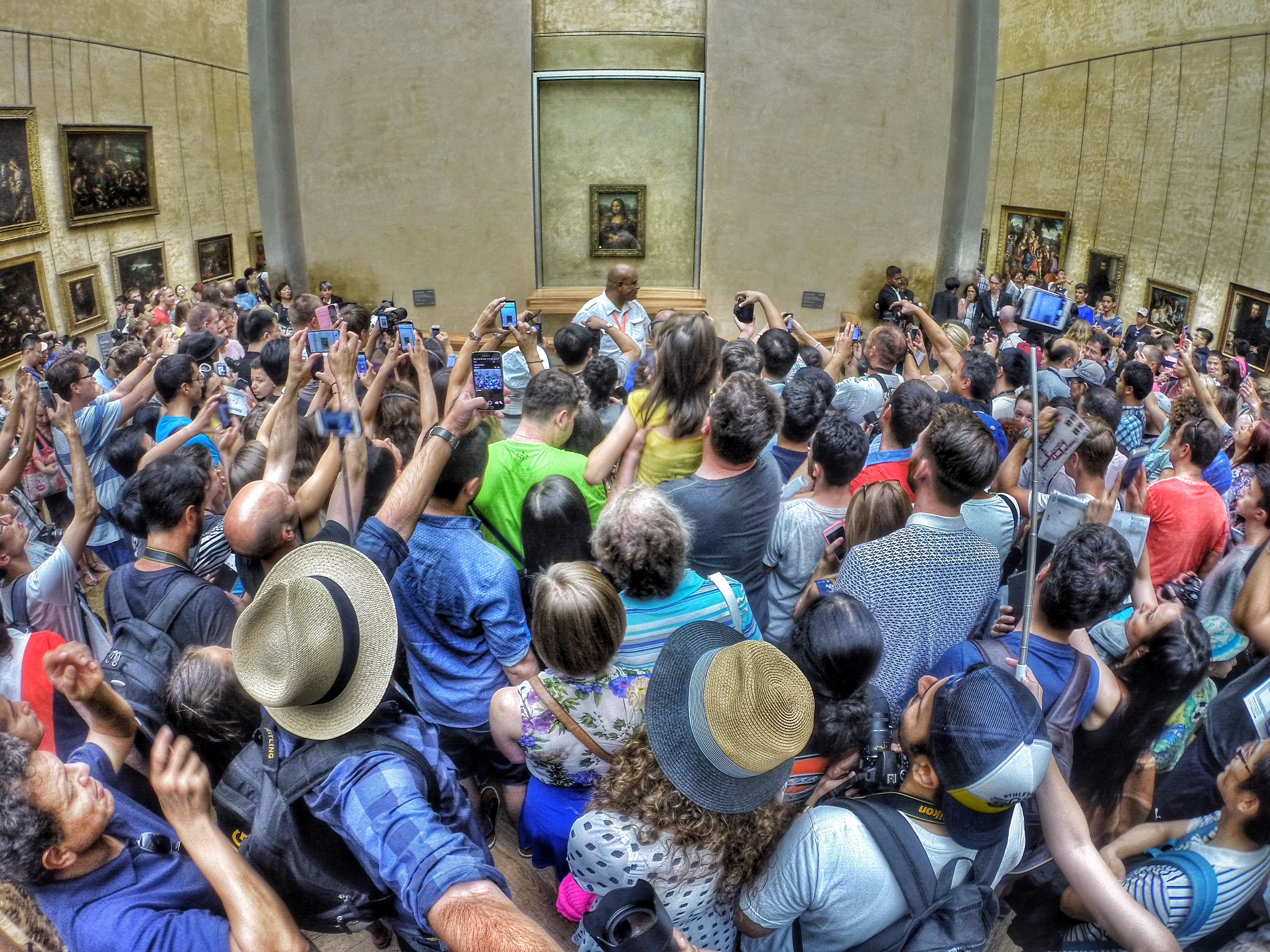 Palais du Louvre .